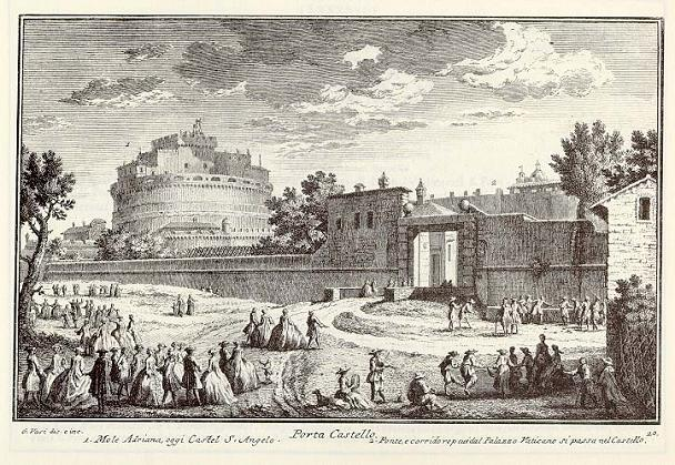 Rappresentazione di Porta Castello da parte di Giuseppe Vasi.